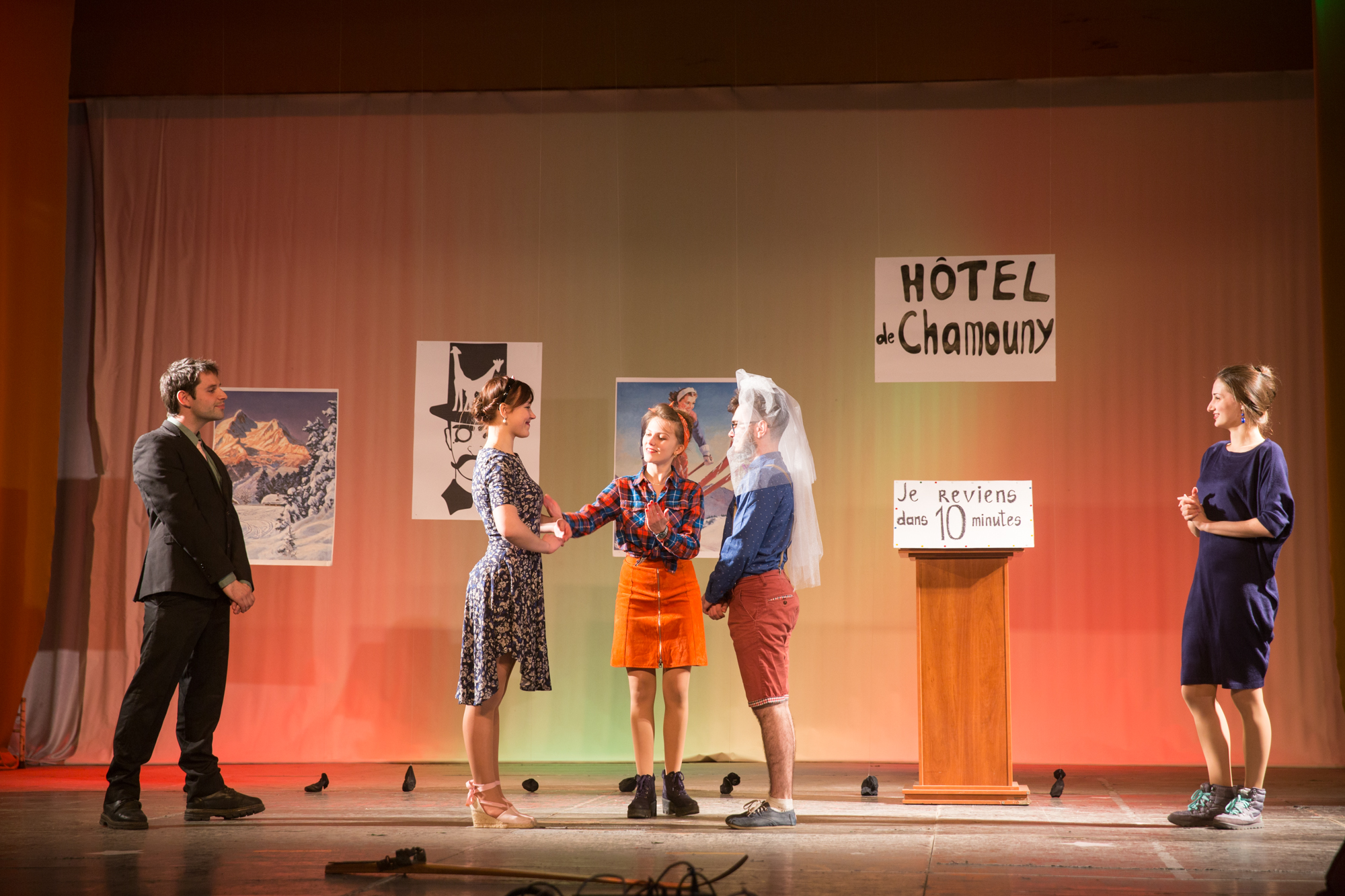 FTF 2017 Prix meilleur troupe "Giraffe dans ma tete", Kharkiv